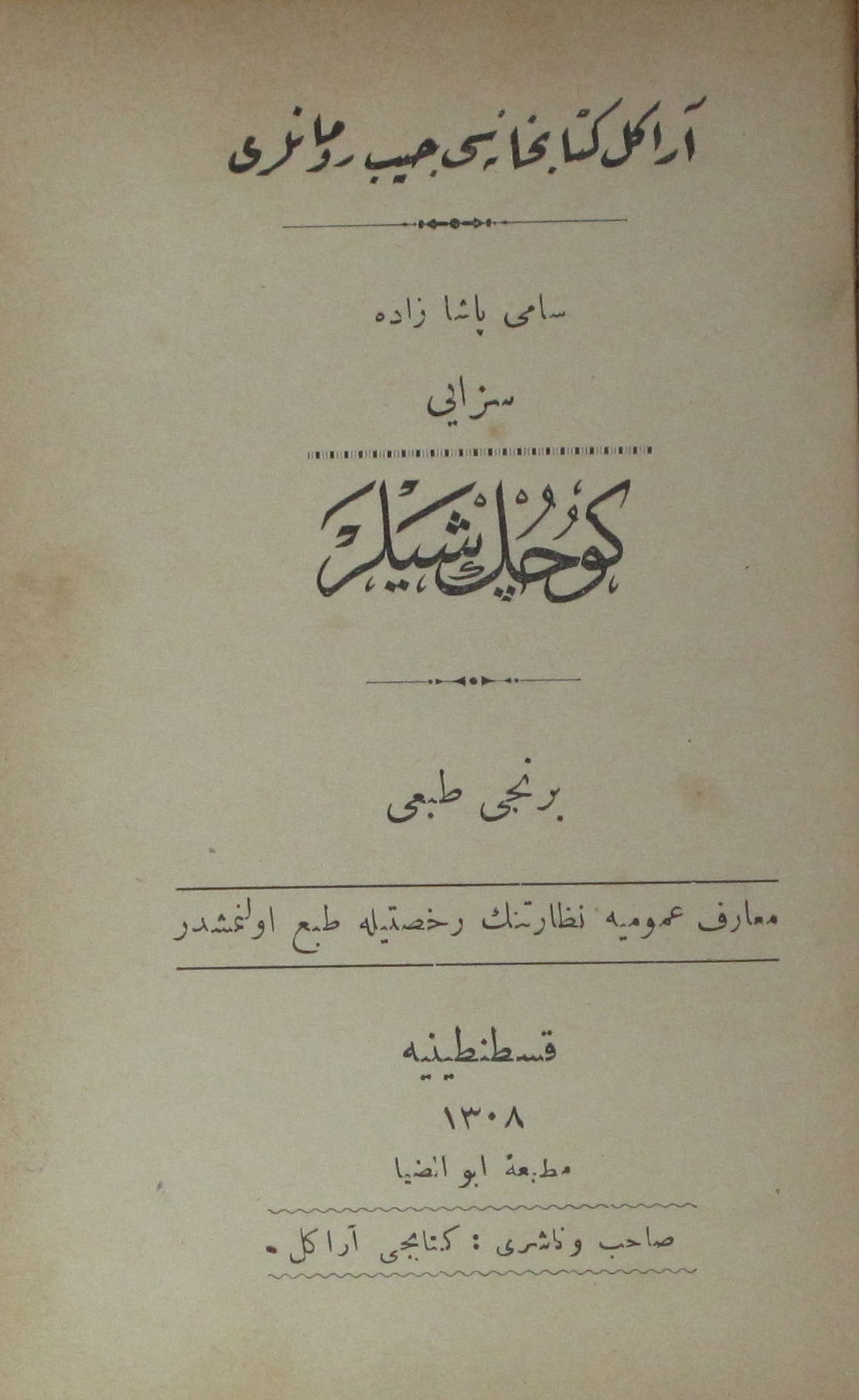 Küçük şeyler كوچوك شيلر / Sami Paşazâde Sezai سامى پاشا زاده سزائى; nşr.: Kitabcı Arakel Yayın Bilgisi : Kostantiniyye (İstanbul) : Matbaa-i Ebüzziya, 1308 H/1891 Fiziksel Nitelik : 104 s.; 16x10 cm. Dizi Kaydı : Arakel Kitabhanesi Ceb Romanları